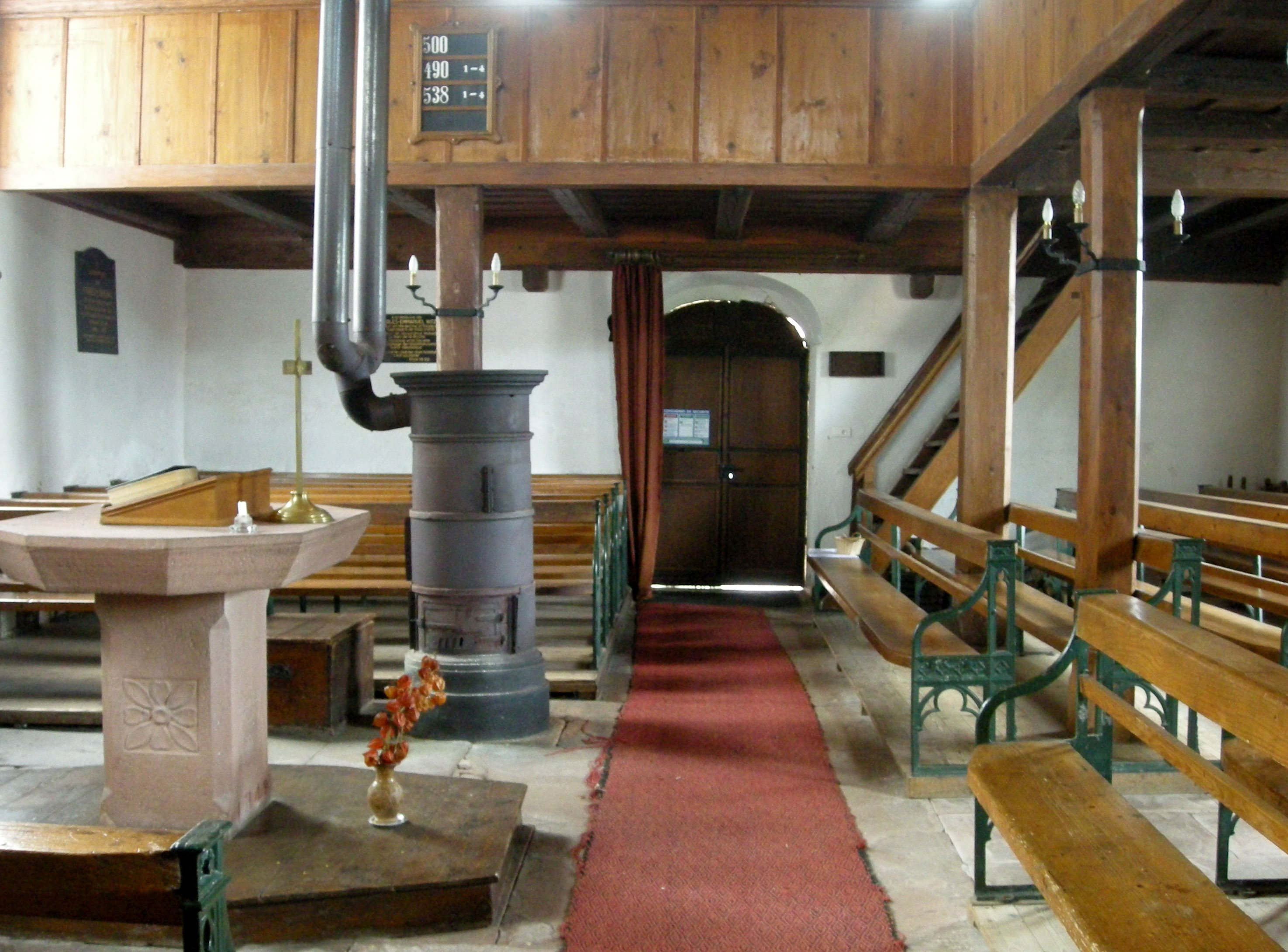 L'intérieur du temple de Waldersbach (Bas-Rhin)